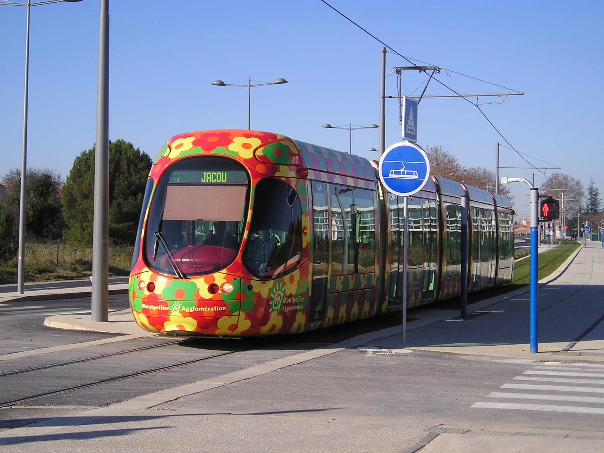 Sur l'avenue de Librilla, entre les stations Saint-Jean-de-Védas Centre et Saint-Jean-le-Sec, une rame de la ligne 2 du tramway de Montpellier en direction de Jacou.